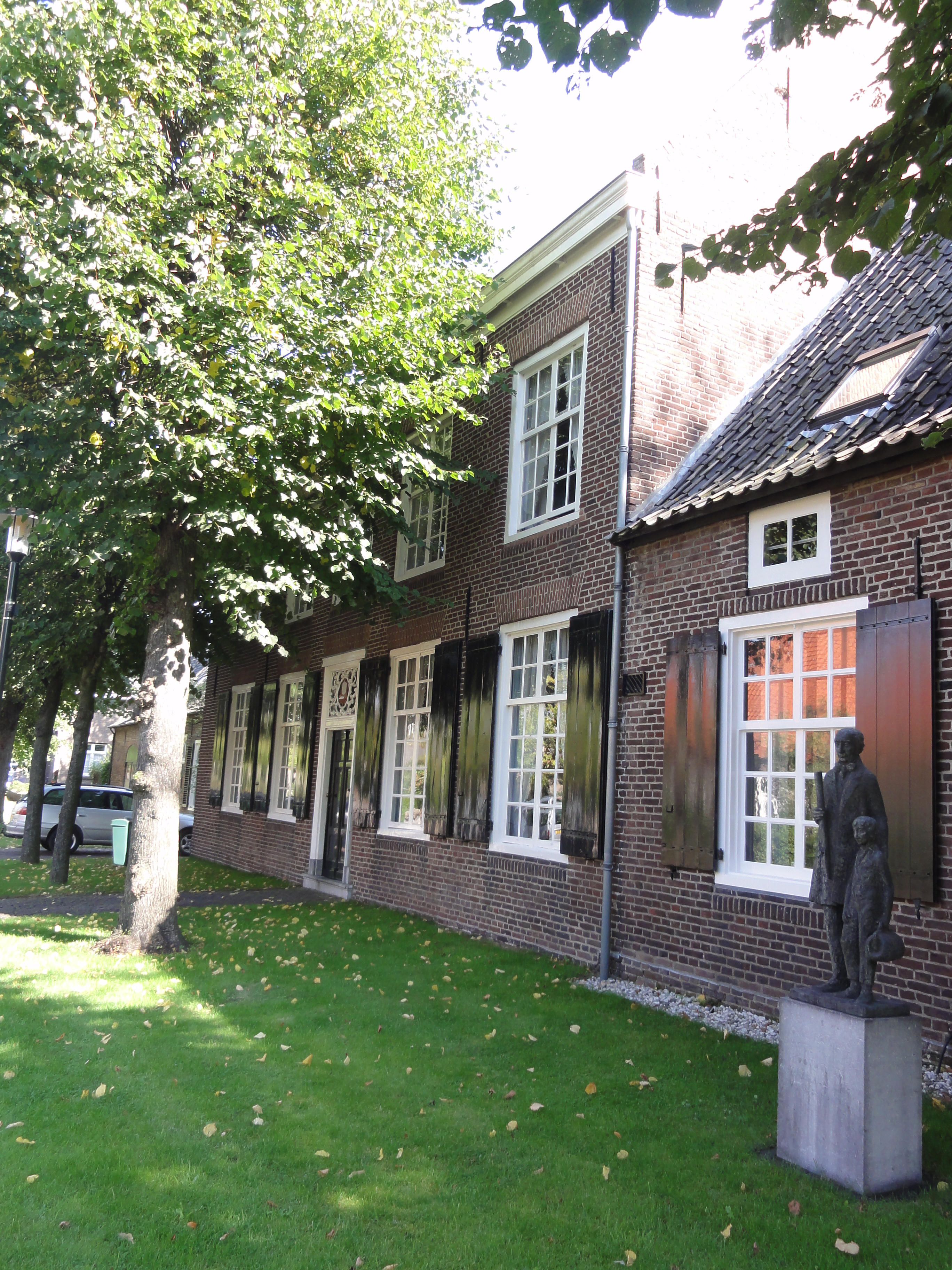 Reek Rijksmonument 33063 Smitshuis (orgelbouwers) Mgr. Borretstraat 7 04″ N, 5° 40′ 58.1″ E Object location51° 44′ 43.94″ N, 5° 40′ 58.37″ E